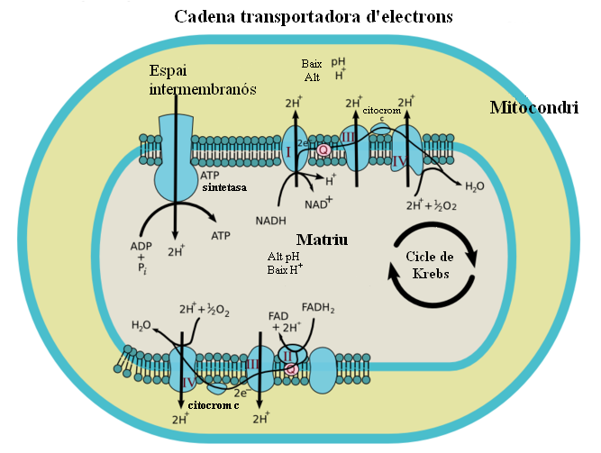 Cadena transportadora d'electrons